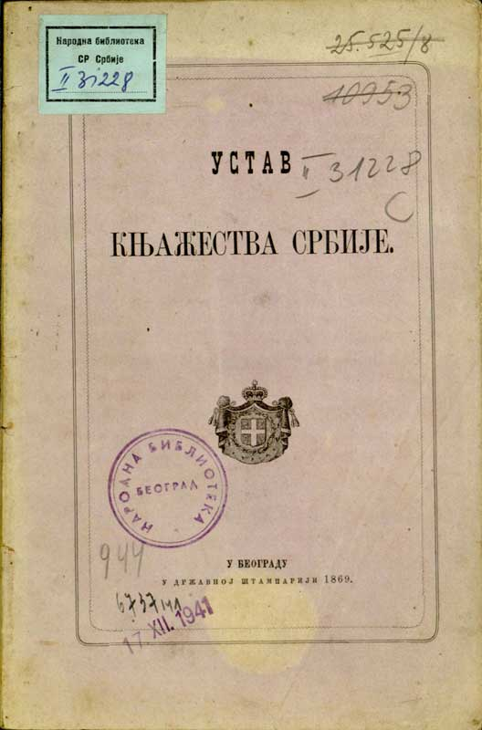 Српски (ћирилица): Устав Србије из 1869. године